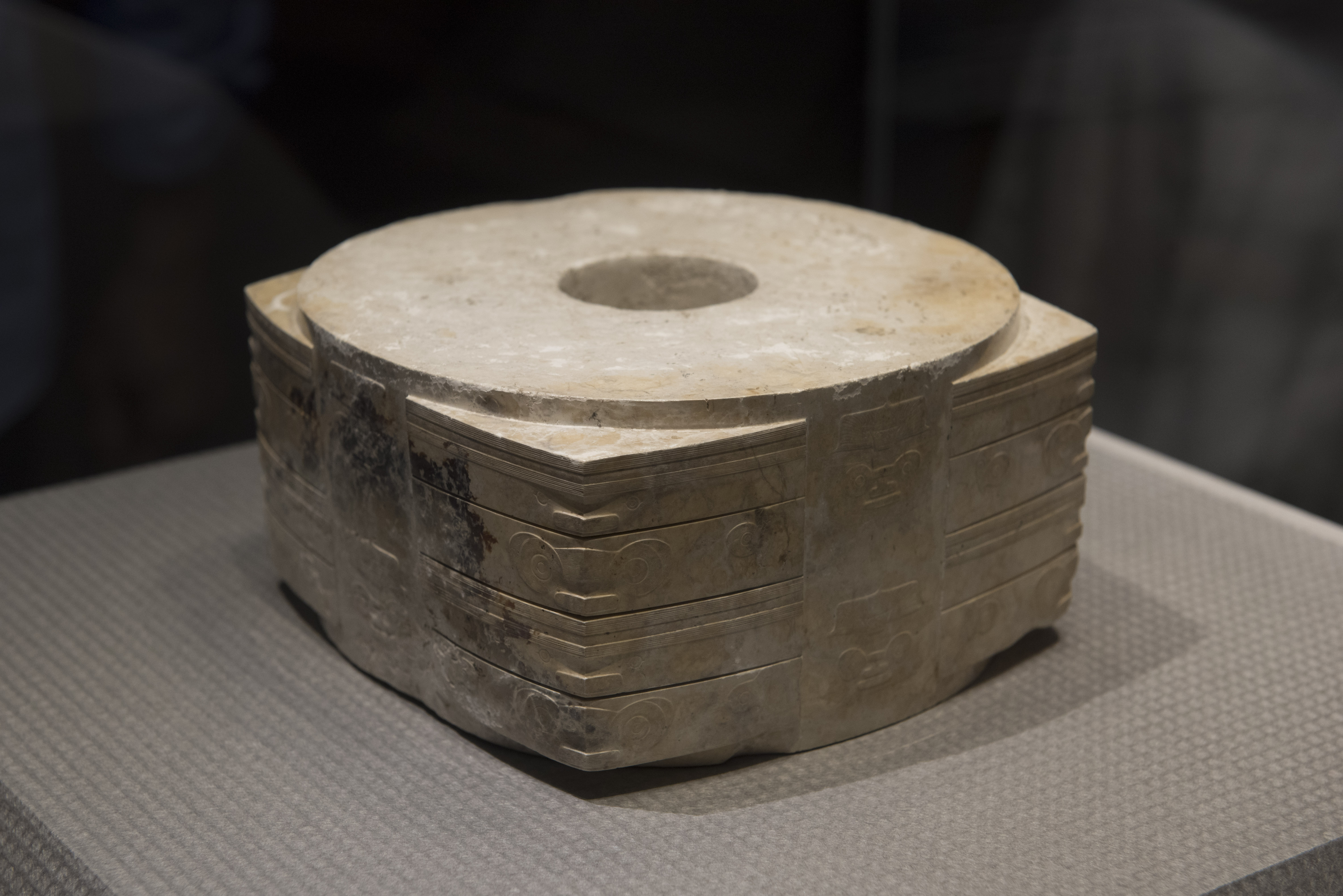 良渚玉琮王